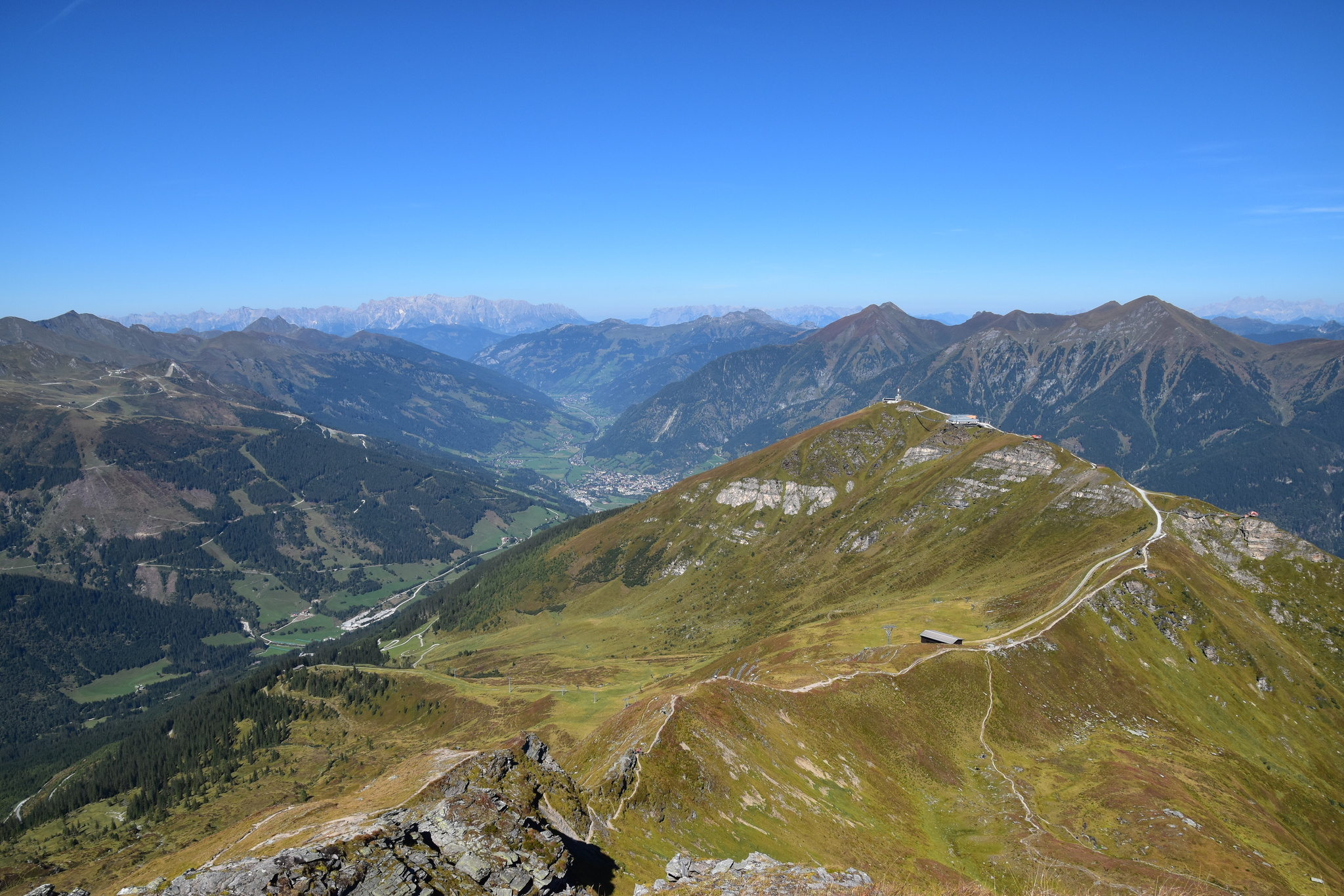 Blick vom Zitterauer Tisch nach Norden, u.a. mit Angertal, Gasteiner Tal, Stubnerkogel und Gamgskarkogel; im Hintergrund das Hochkönig-Massiv.